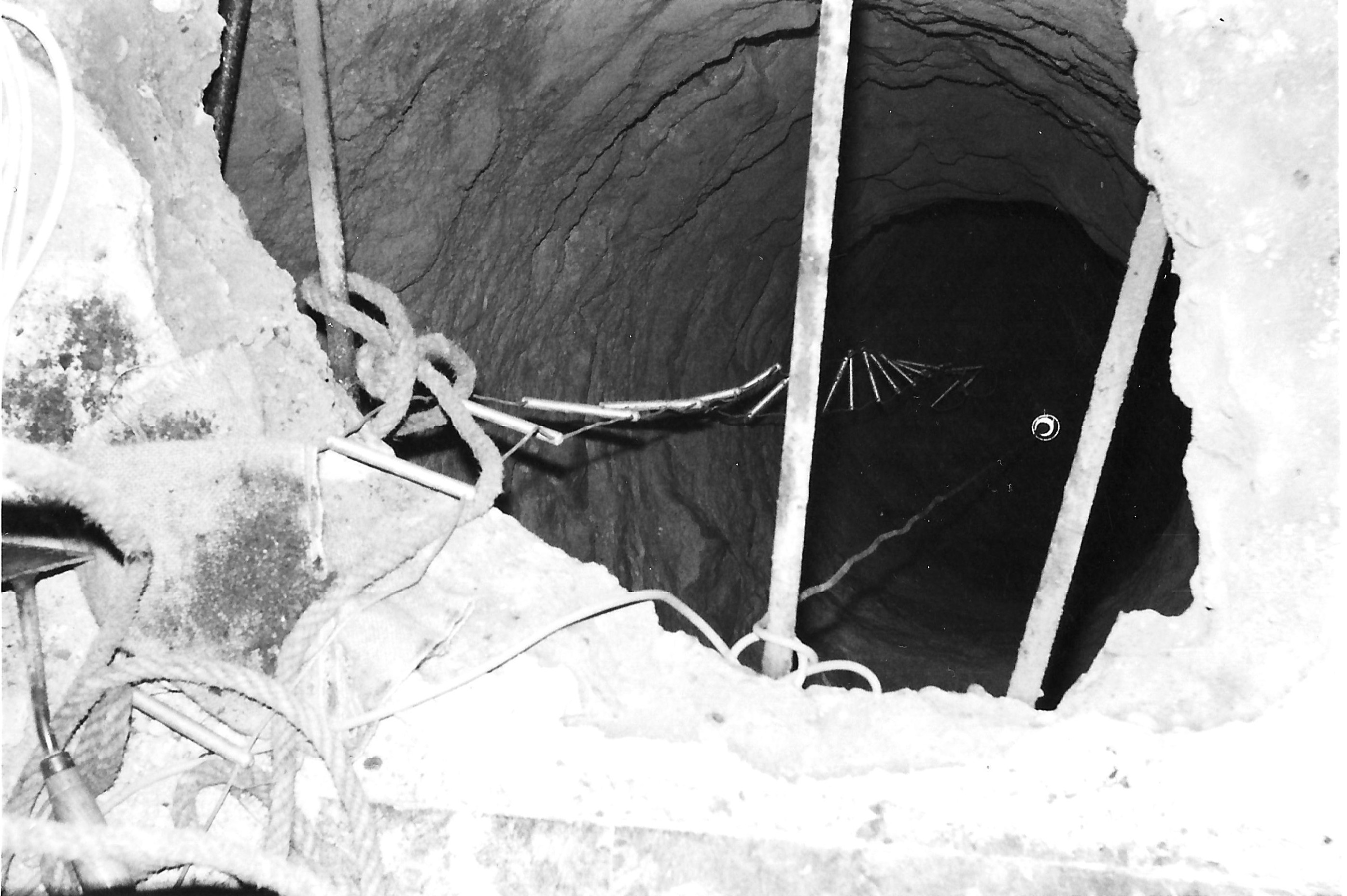 Pou sota la cripta (25 m. de fons), crea un Axis Mundi de prop de 60 metres d'alt fins la clau de volta